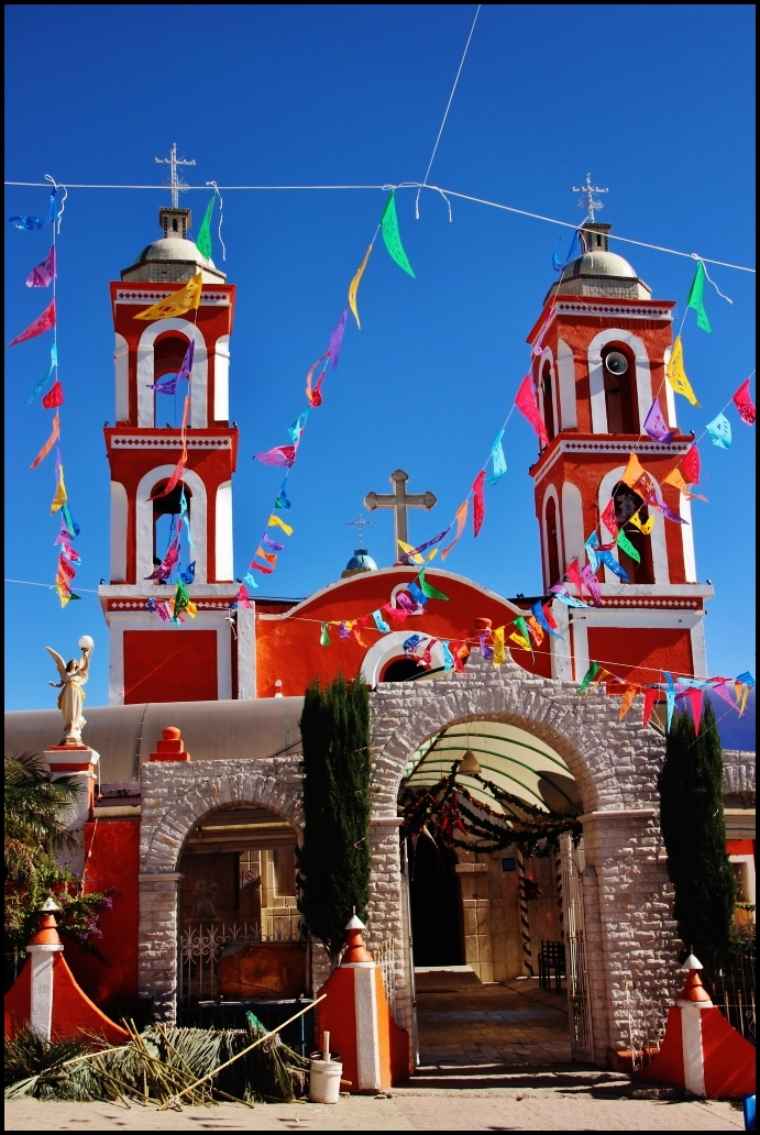 Santuario del Divino Niño de la Candelaria, Huehuetlán el Grande, Estado de Puebla, México.